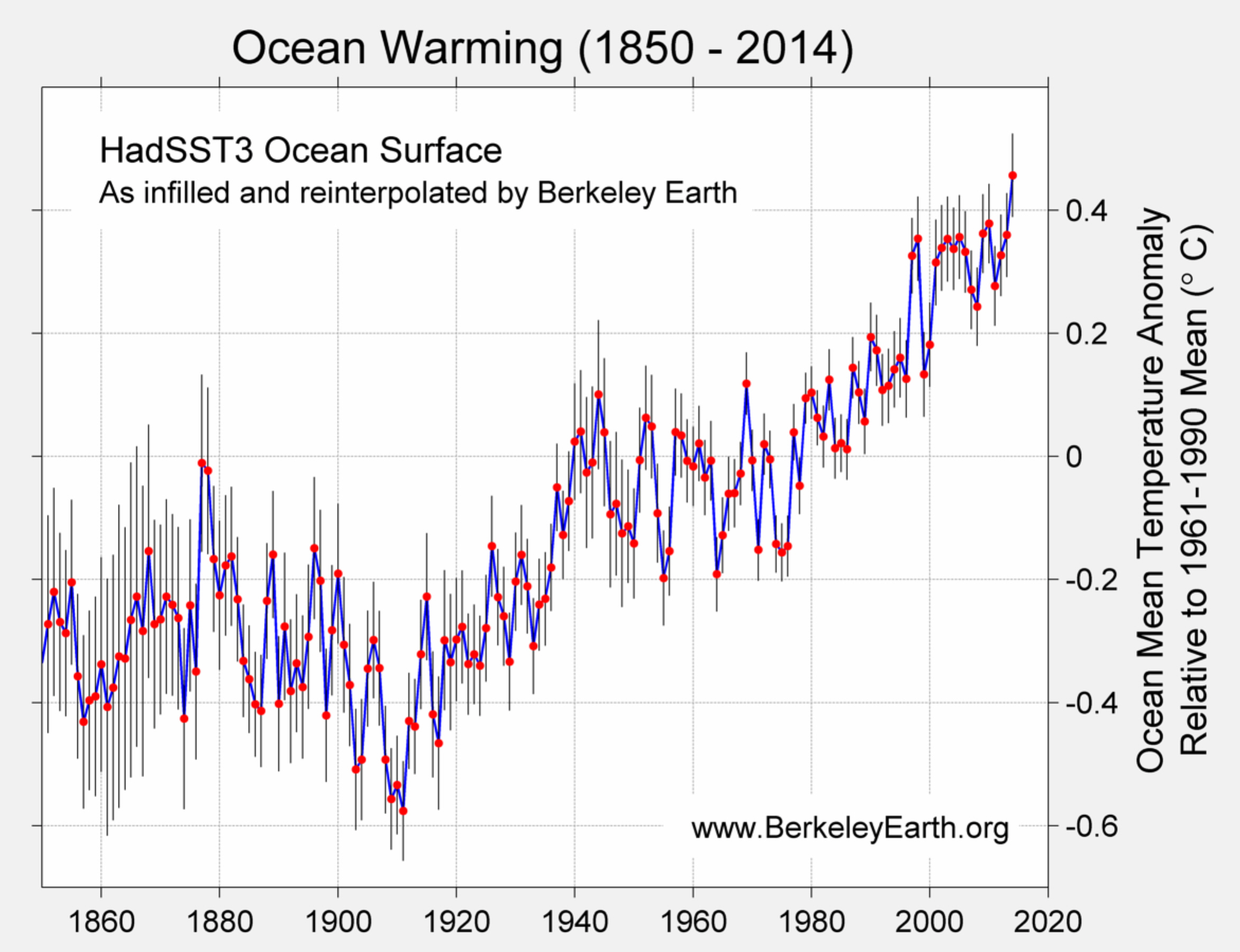 ber. Temperaturveränderung über Ozeanflächen rel. zu Mittelwert "1961-1990" 2014 0.457 ±0.068°C 2010 0.378 ±0.065°C 2009 0.362 ±0.064°C 2013 0.360 ±0.051°C 2005 0.356 ±0.068°C 1998 0.354 ±0.069°C 2003 0.353 ±0.069°C 2002 0.339 ±0.070°C 2004 0.337 ±0.067°C 2006 0.332 ±0.066°C